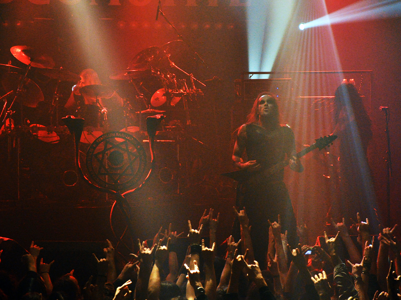 Behemoth en concert à la Locomotive, à Paris, le 27/10/2009.